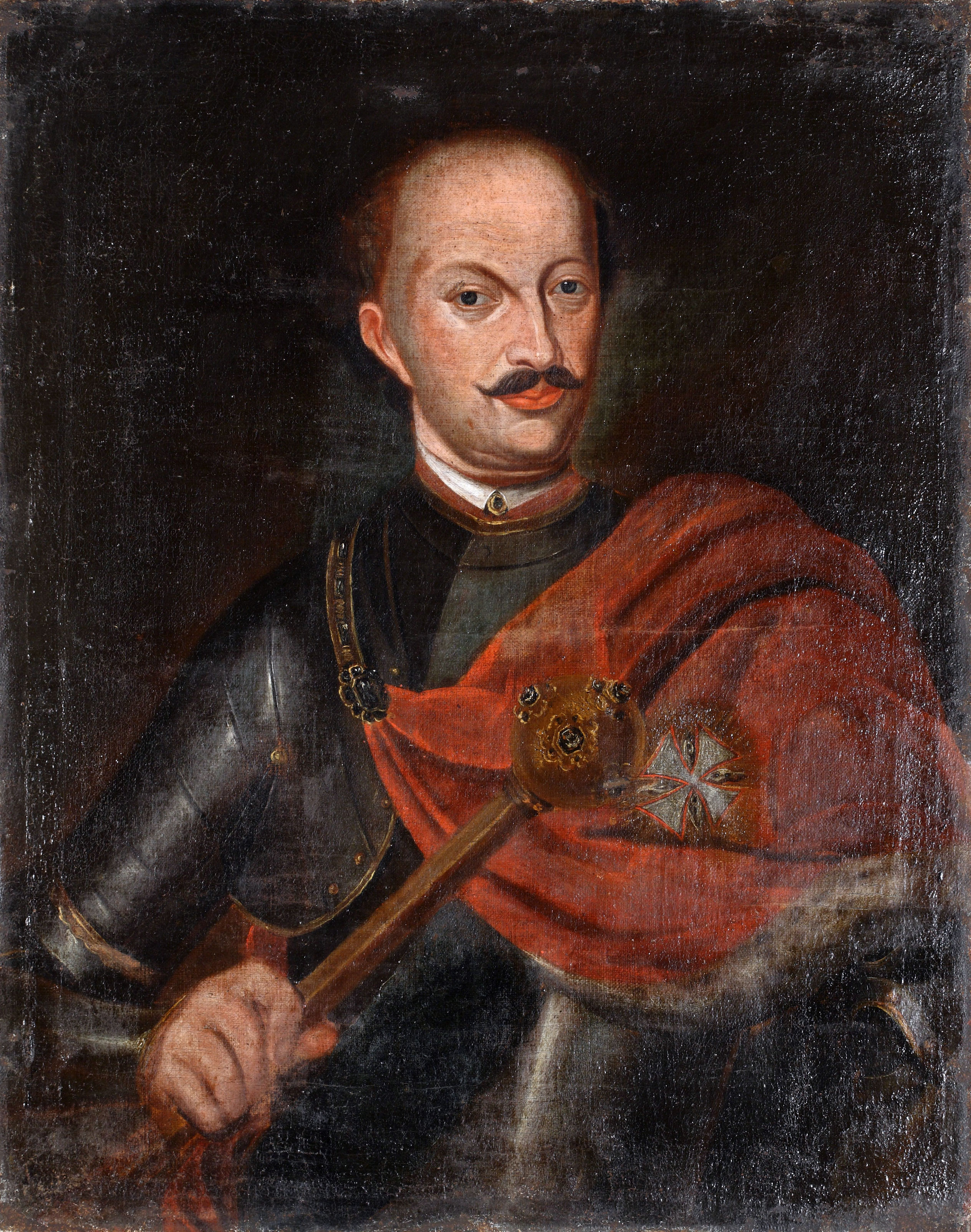 Беларуская (тарашкевіца): Партрэт Яна Казімера Сапегі (Jan Kazimier Sapieha) гербу «Ліс» (каля 1670 — 1730), дзяржаўнага і вайсковага дзеяча Вялікага Княства Літоўскага, гетмана вялікага літоўскага, генэрал-фэльдмаршала расейскай службы, генэрал-губэрнатара Пецярбургу.